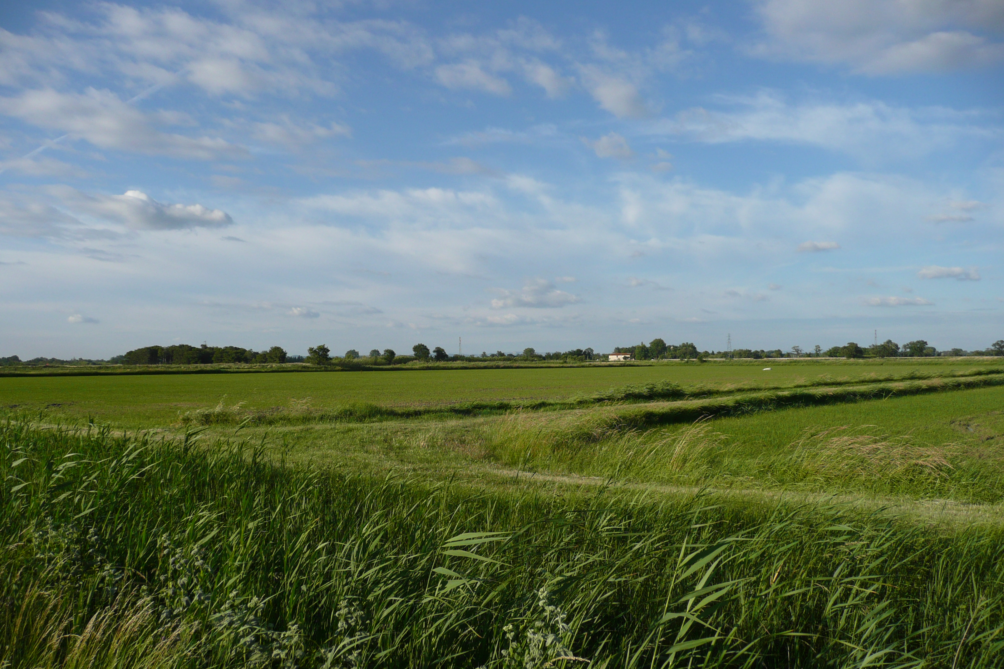 Champ de taille moyenne près de l'étang de Vaccarès.